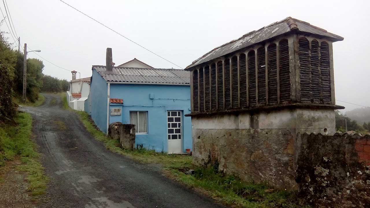 Vista do Redondo, O Val.